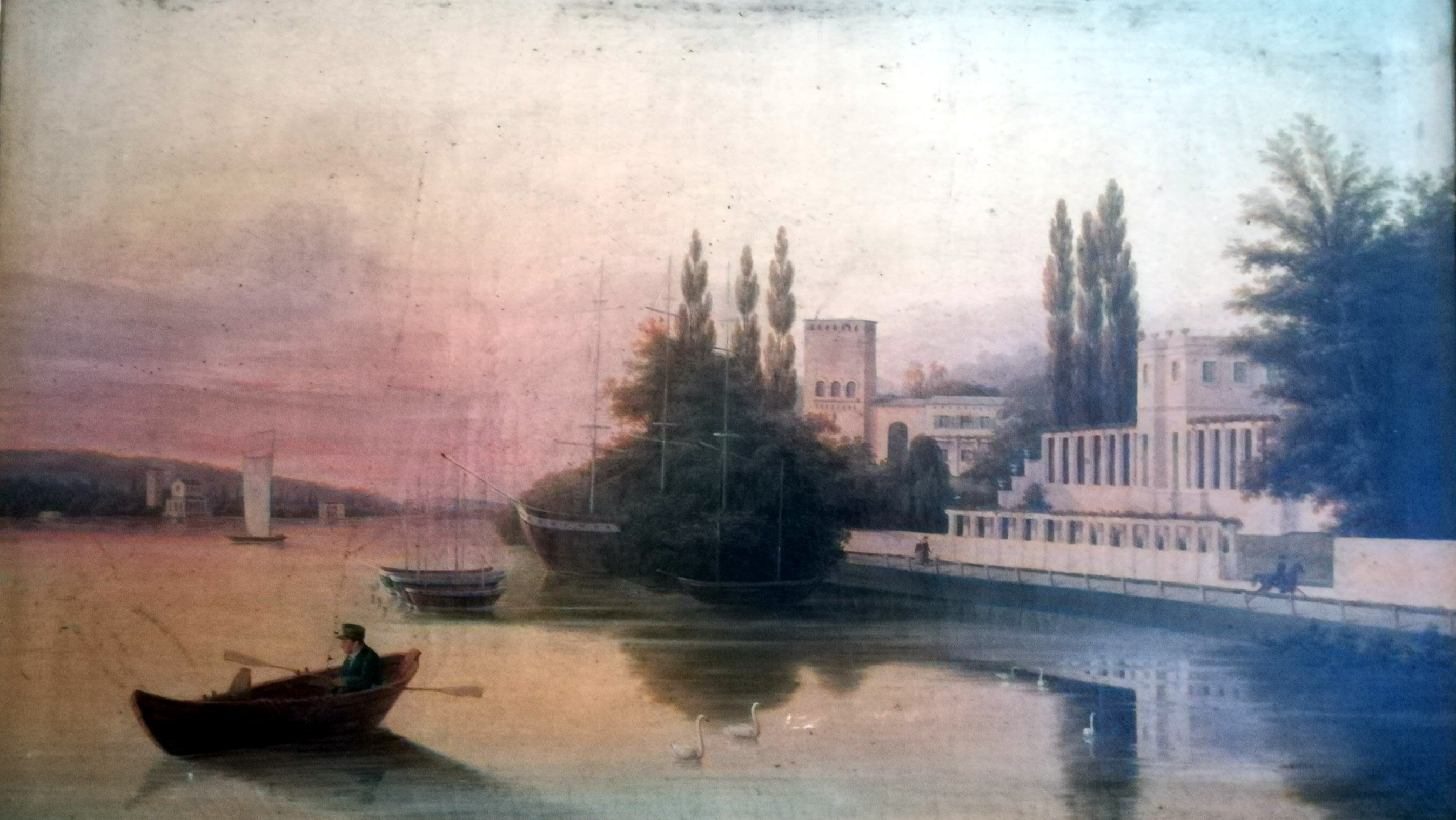 Glienicker Ufer bei Potsdam mit Casino und Maschinenhaus um 1850